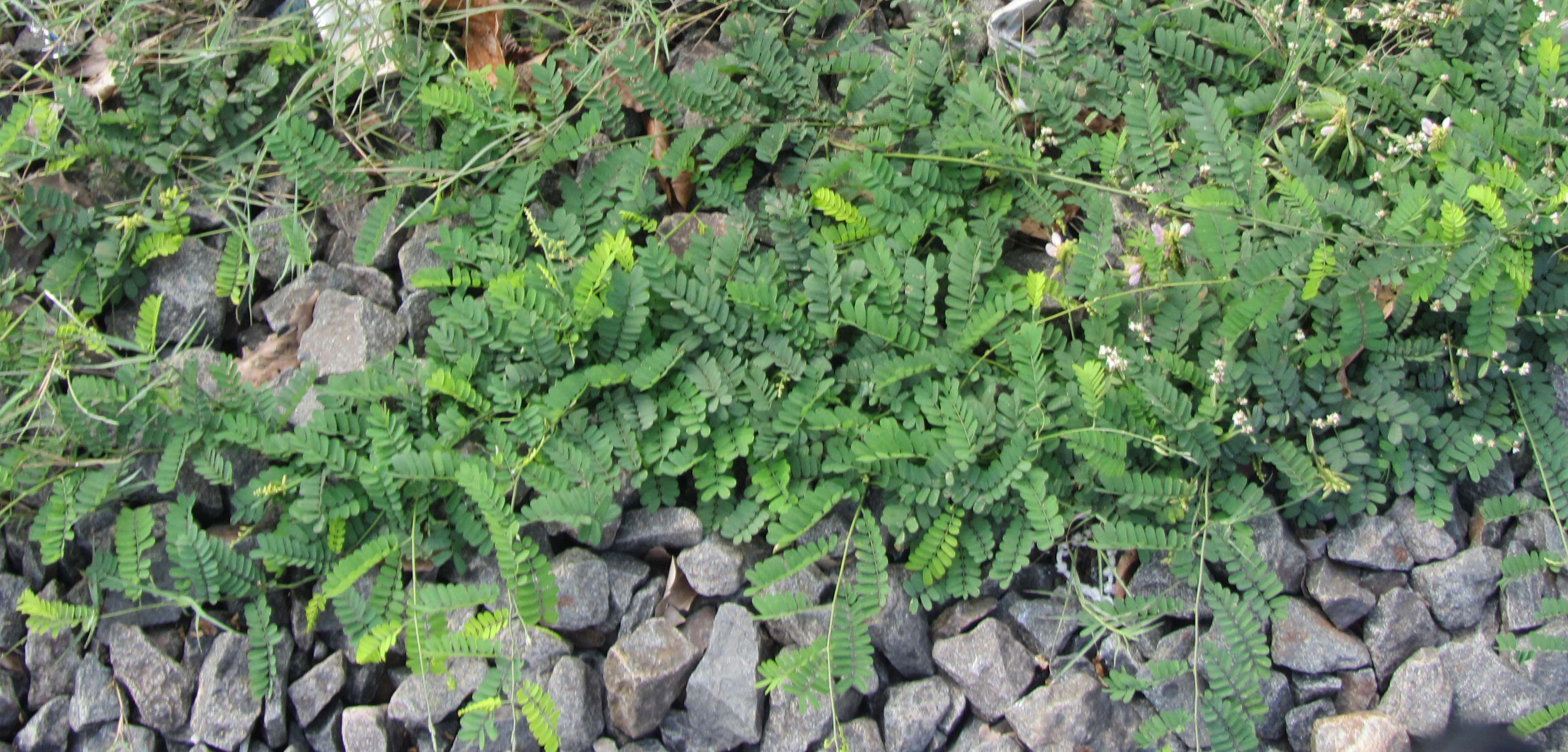 குன்றிமணிச் செடி. திருக்குறள் 277 புறங்குன்றி கண்டனைய ரேனும் அகங்குன்றி மூக்கிற் கரியா றுடைத்து. own shot.